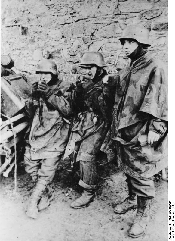 Note: This description has been identified as biased or incorrect: East german propaganda. ADN-ZB II. Weltkrieg 1939-45 Die Ardennenoffensive der deutschen Wehrmacht gegen die alliierten Truppen in Westeuropa beginnt am 16.12.1944. Nach anfänglichen Erfolgen müssen die deutschen Truppen am 27. Dezember die Offensive einstellen und sich bis Ende Januar 1945 auf ihre Ausgangsstellungen zurückziehen. Junge Angehörige einer Volksgrenadiereinheit werden nach anstrengenden Marsch während des Rückzuges Anfang Januar 1945 im Rheinland mit Heißgetränken versorgt. Aufnahme: Henisch [Scherl Bilderdienst]